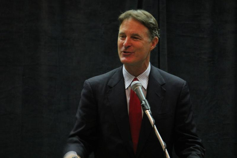 2012dncconvention-080